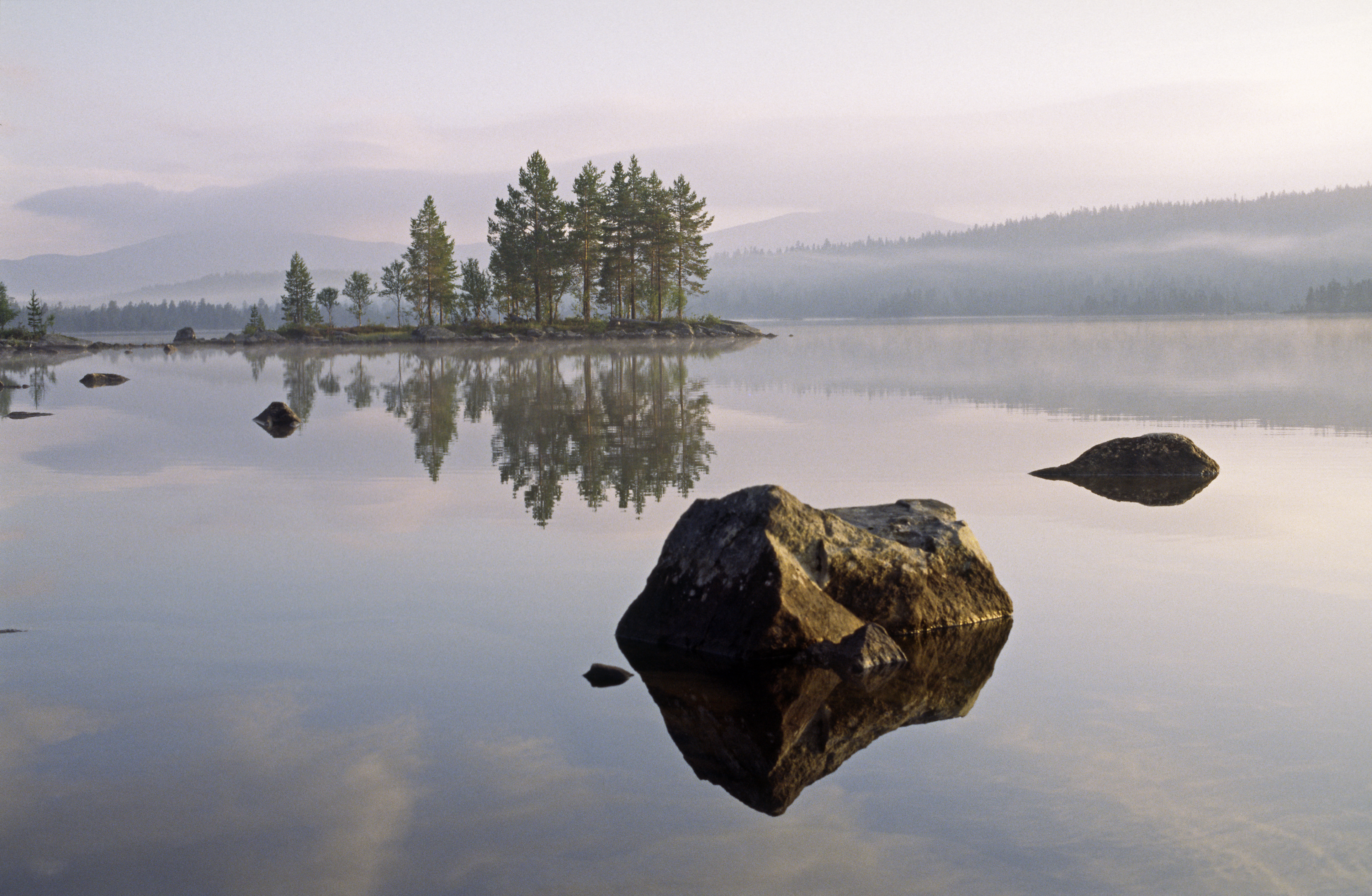 Morgenstimmung am Gutulisjøen, Gutulia-Nationalpark, Südost-Norwegen.